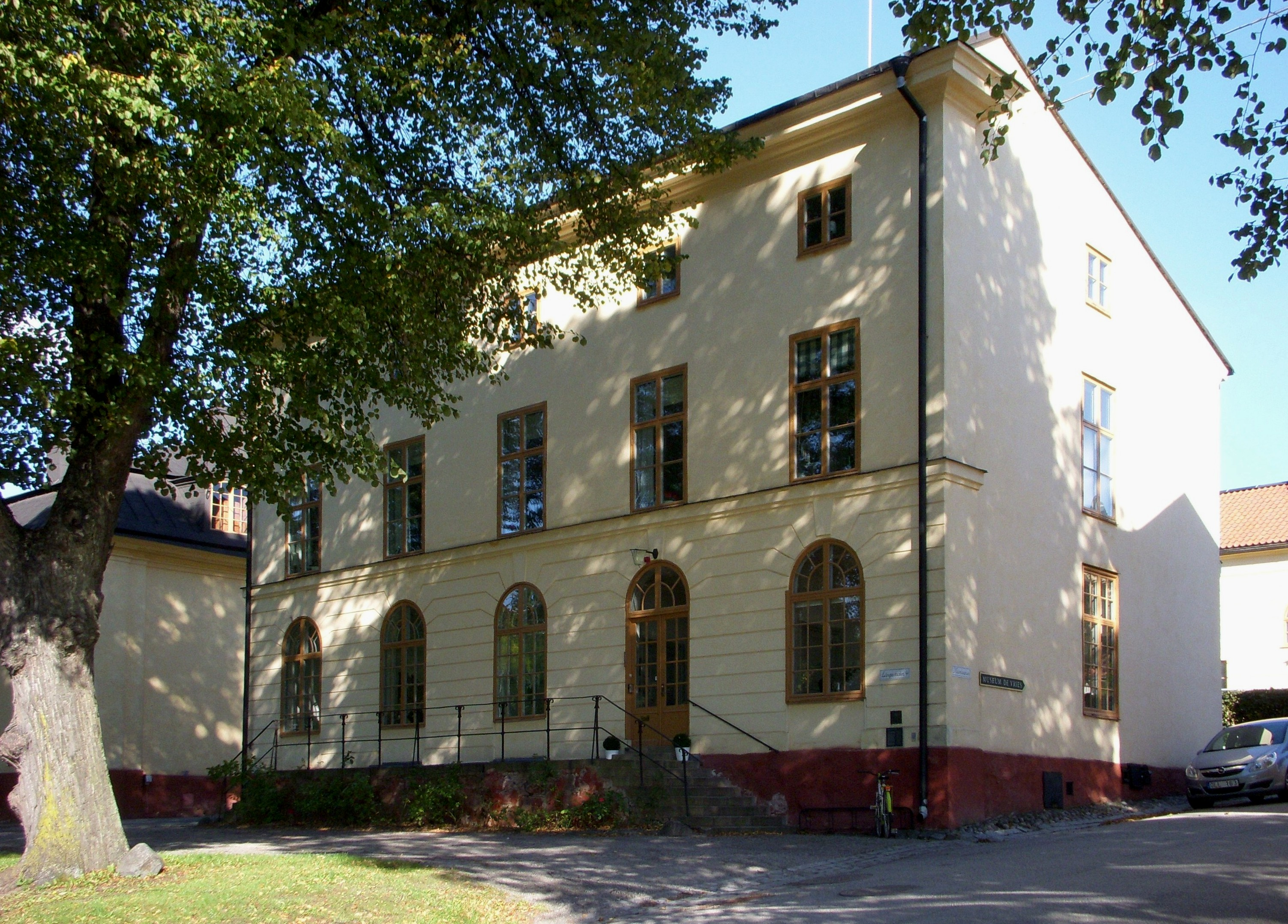 Långa raden 4 på Drottningholmsmalen "Apotekshuset"